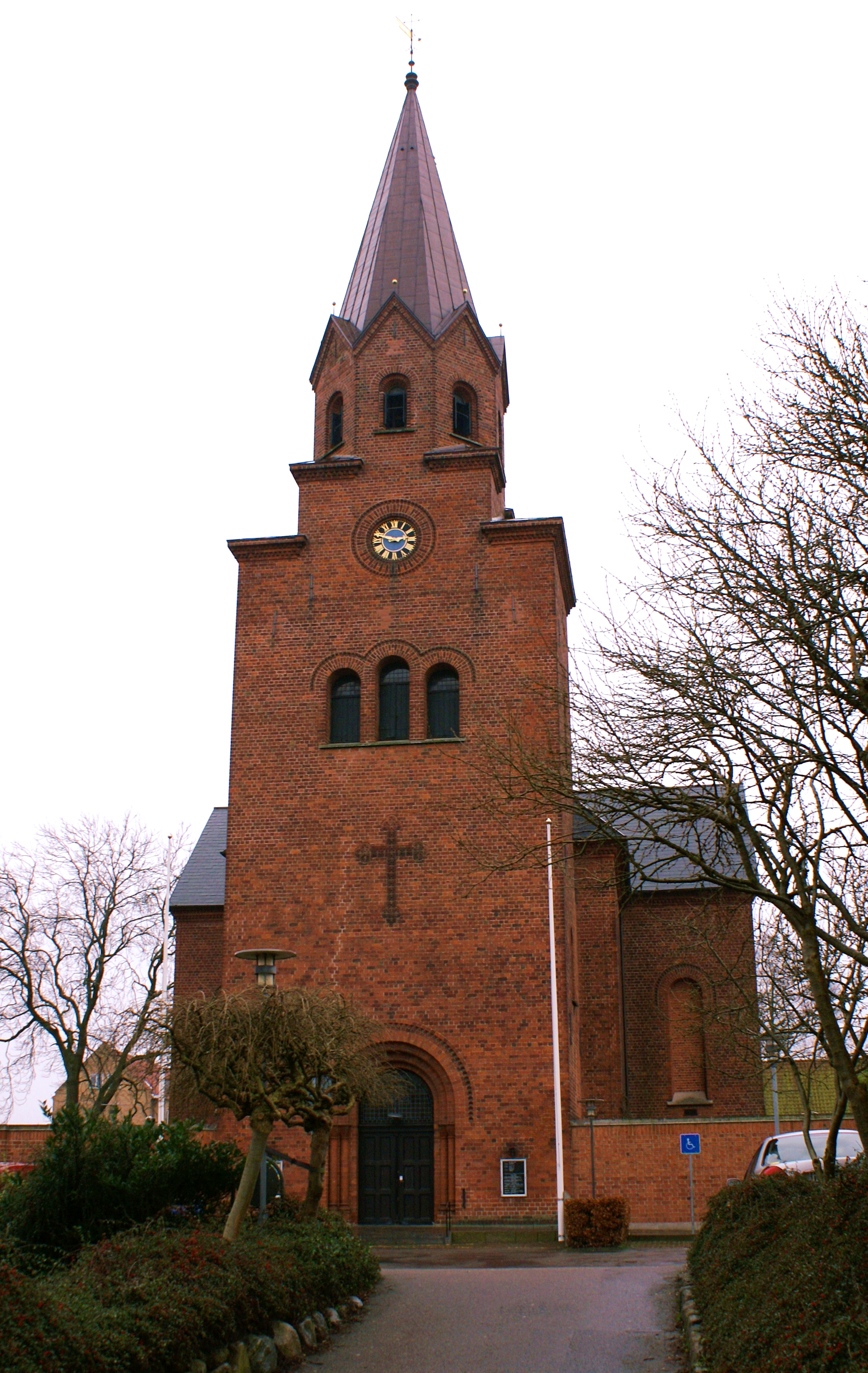 Sankt Nikolaj Kirke, Holbæk, Danmark